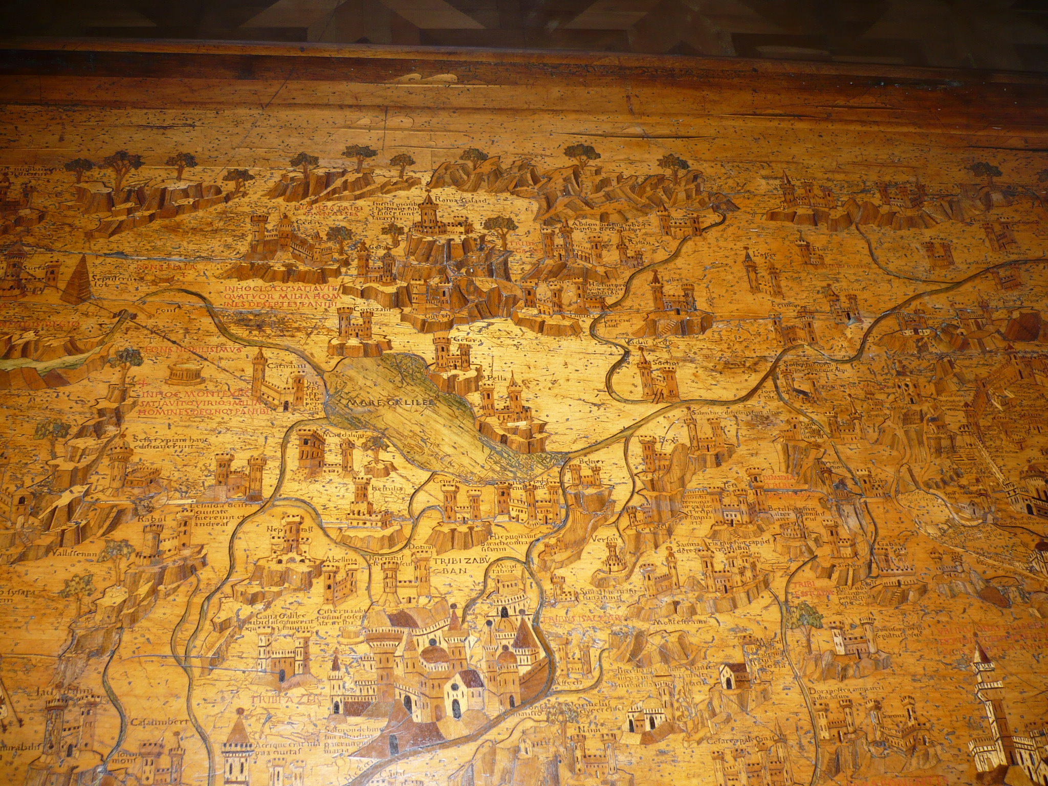 Blat stołu w zamku, w Olesku